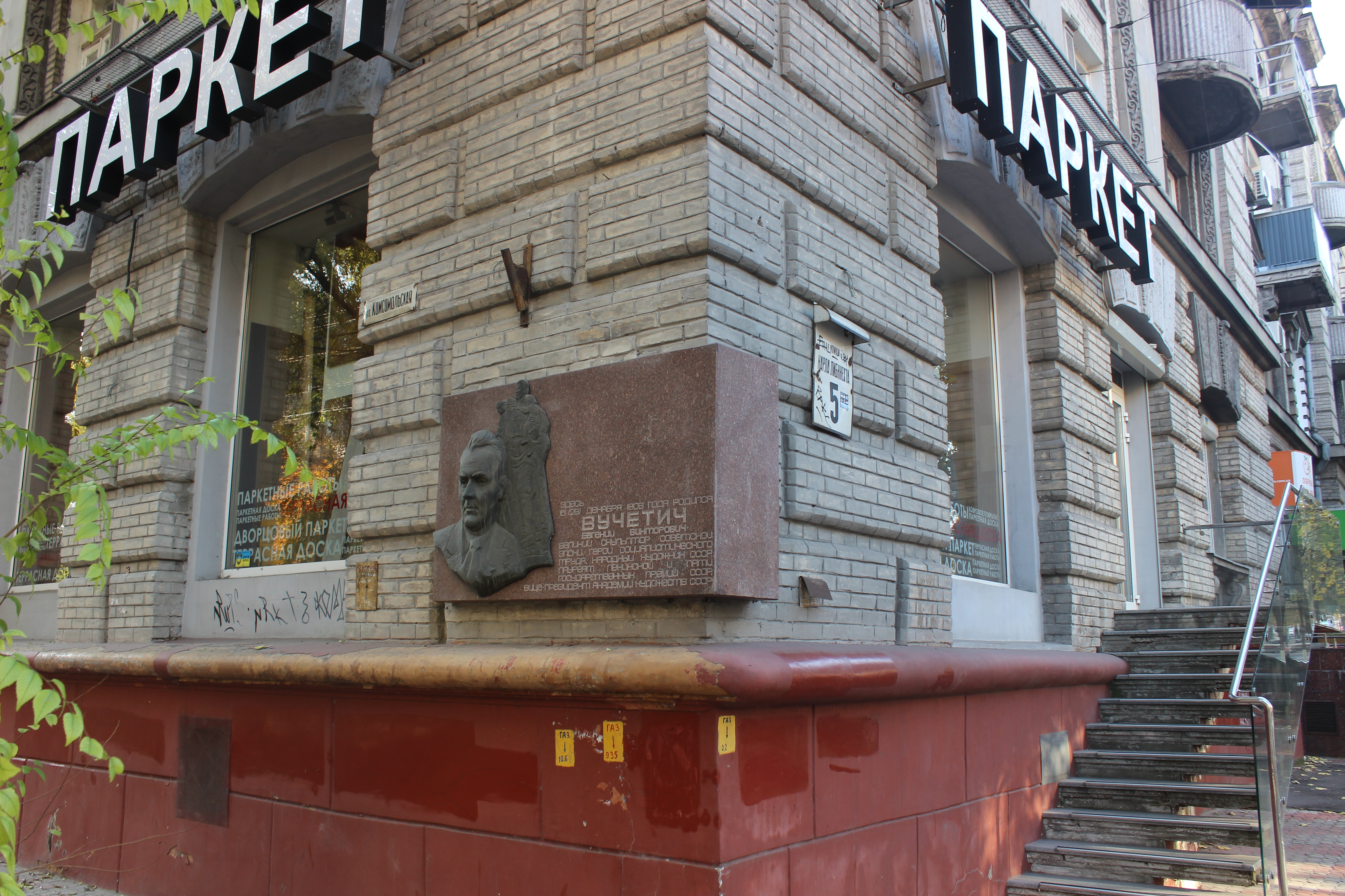 Мем. дошка Пам’ятний знак на честь героя Соціалістичної праці, скульптора, лауреата Ленінської та Державної премії СРСР, віце-президента академії мистецтв СРСР Є.В. Вучетича (1908-1974). Встановлений на місці дому, де він народився, Дніпро, вул. М. Грушевського, 5